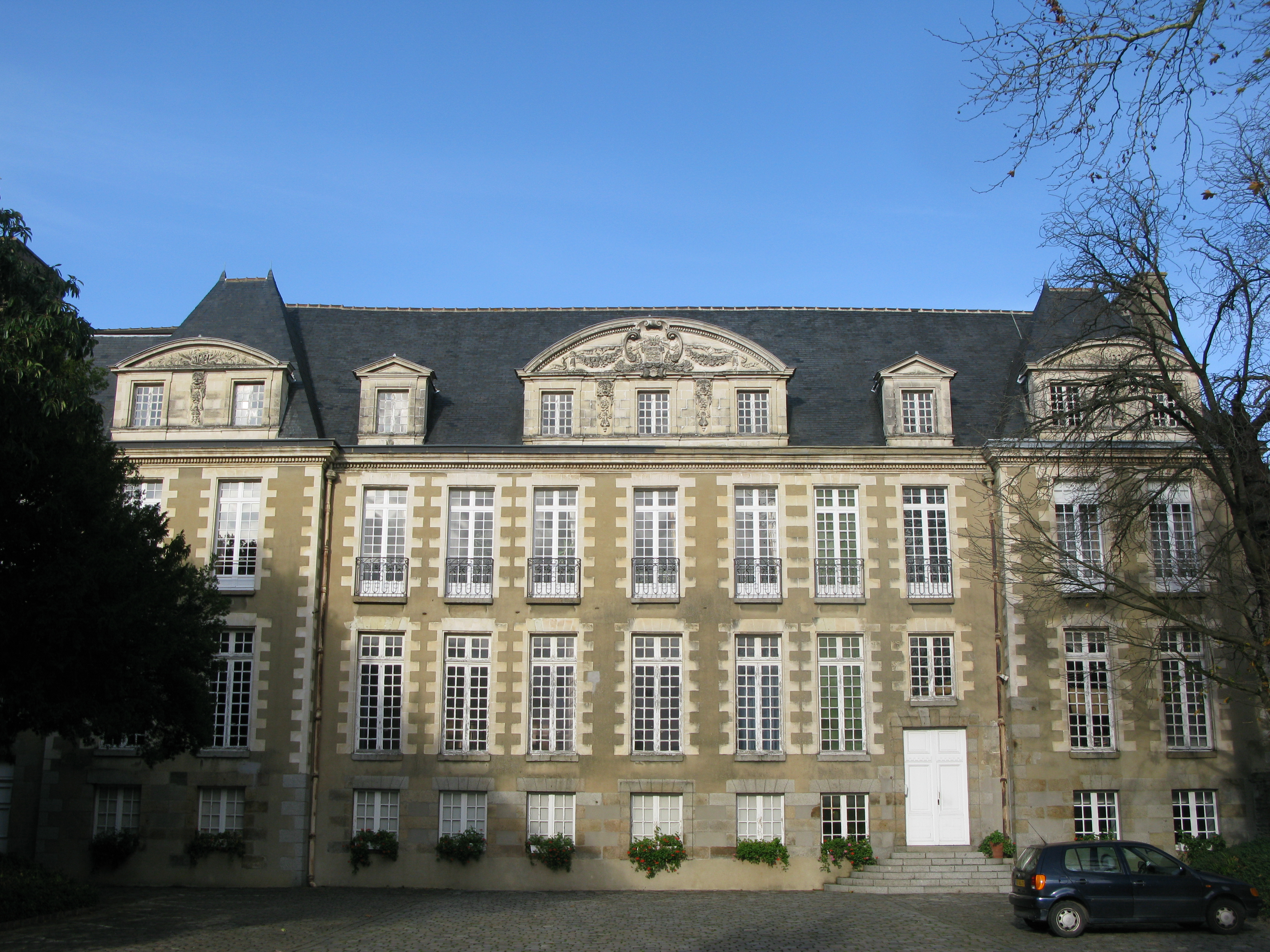 Palais de l'archevêché à Rennes, jouxtant l'église St Melaine. Utilisé à partir de la fin du XIX par la faculté de droit de Rennes jusqu'au lendemain de la 2sd guerre mondiale.